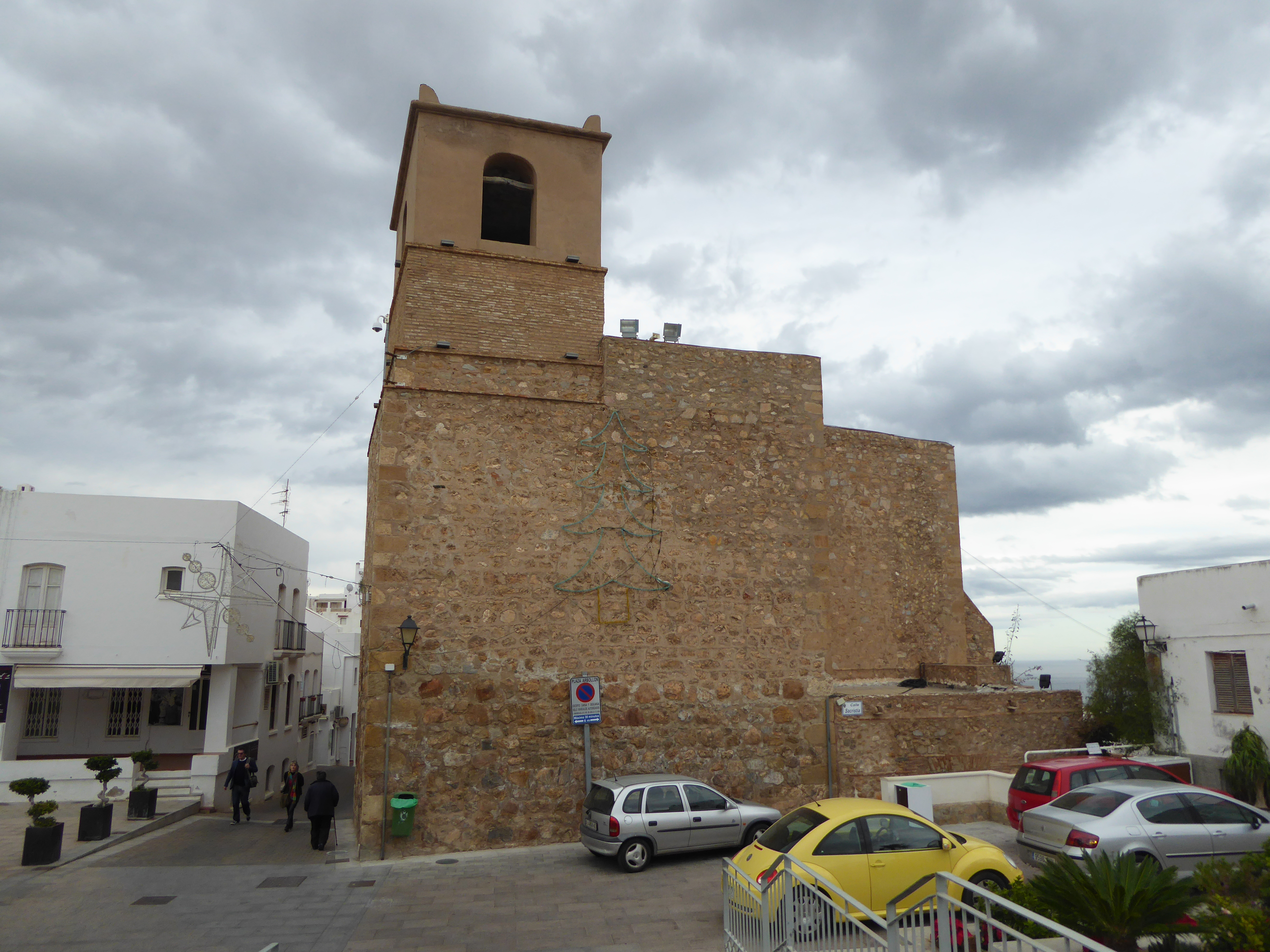 Iglesia Fortaleza